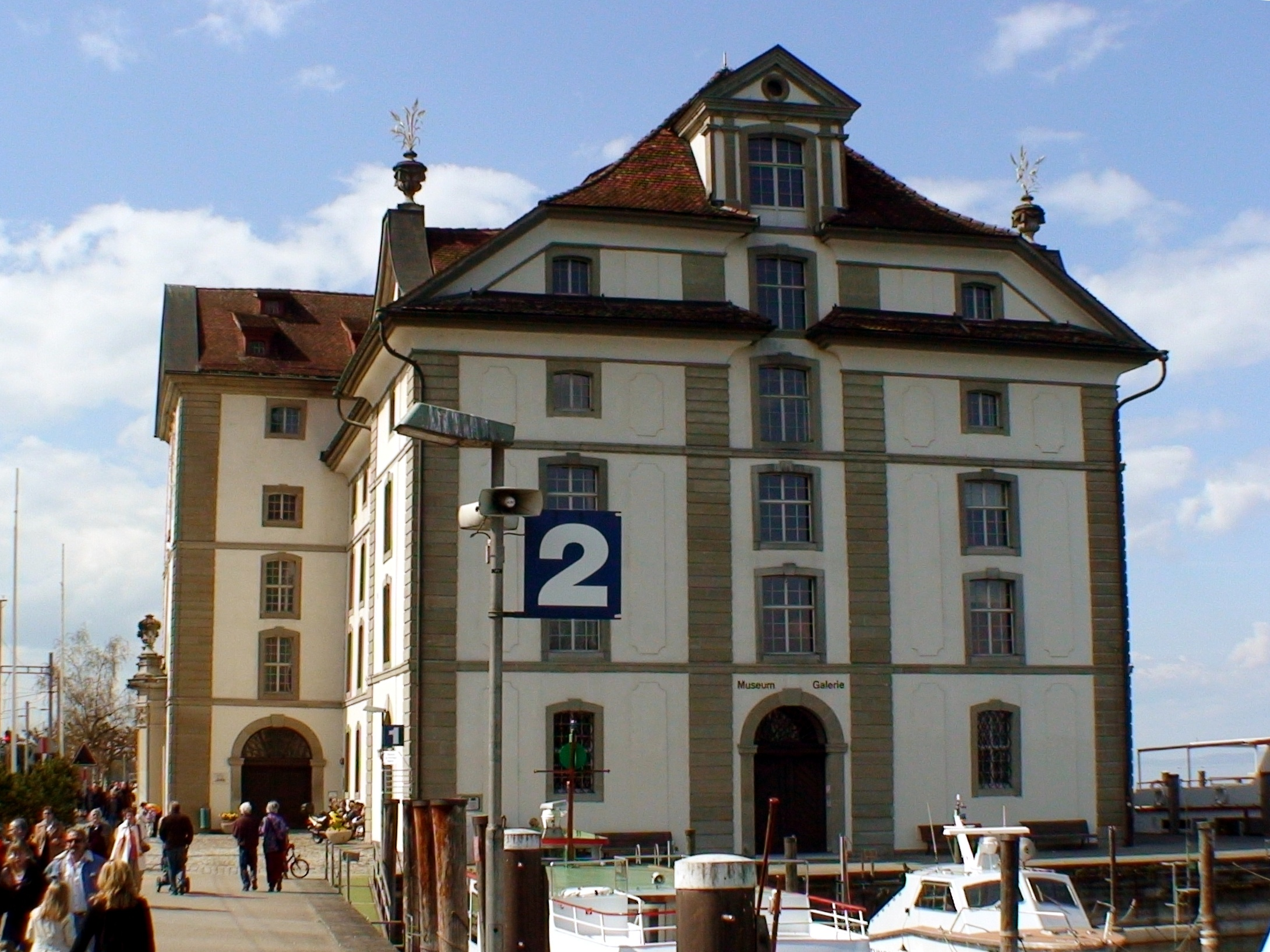 Rorschach, Schweiz